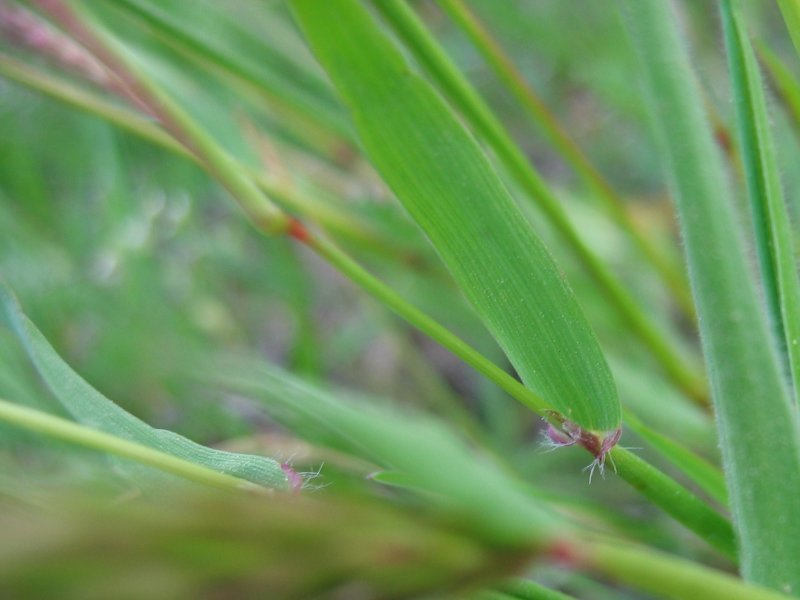 Gewöhnliches Ruchgras Anthoxanthum odoratum